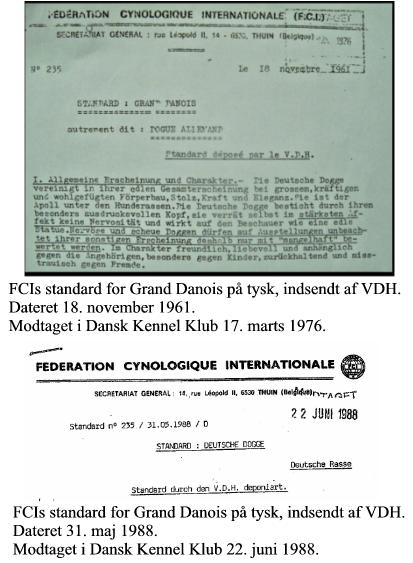 Uddrag af standard for Grand Danois, indsendt af VDH 18. november 1961. Modtaget i Dansk Kennel Klub den 17. marts 1976 + uddrag af standard for Grand Danois, indsendt af VDH 31. maj 1988. Modtaget i Dansk Kennel Klub 22. juni 1988.